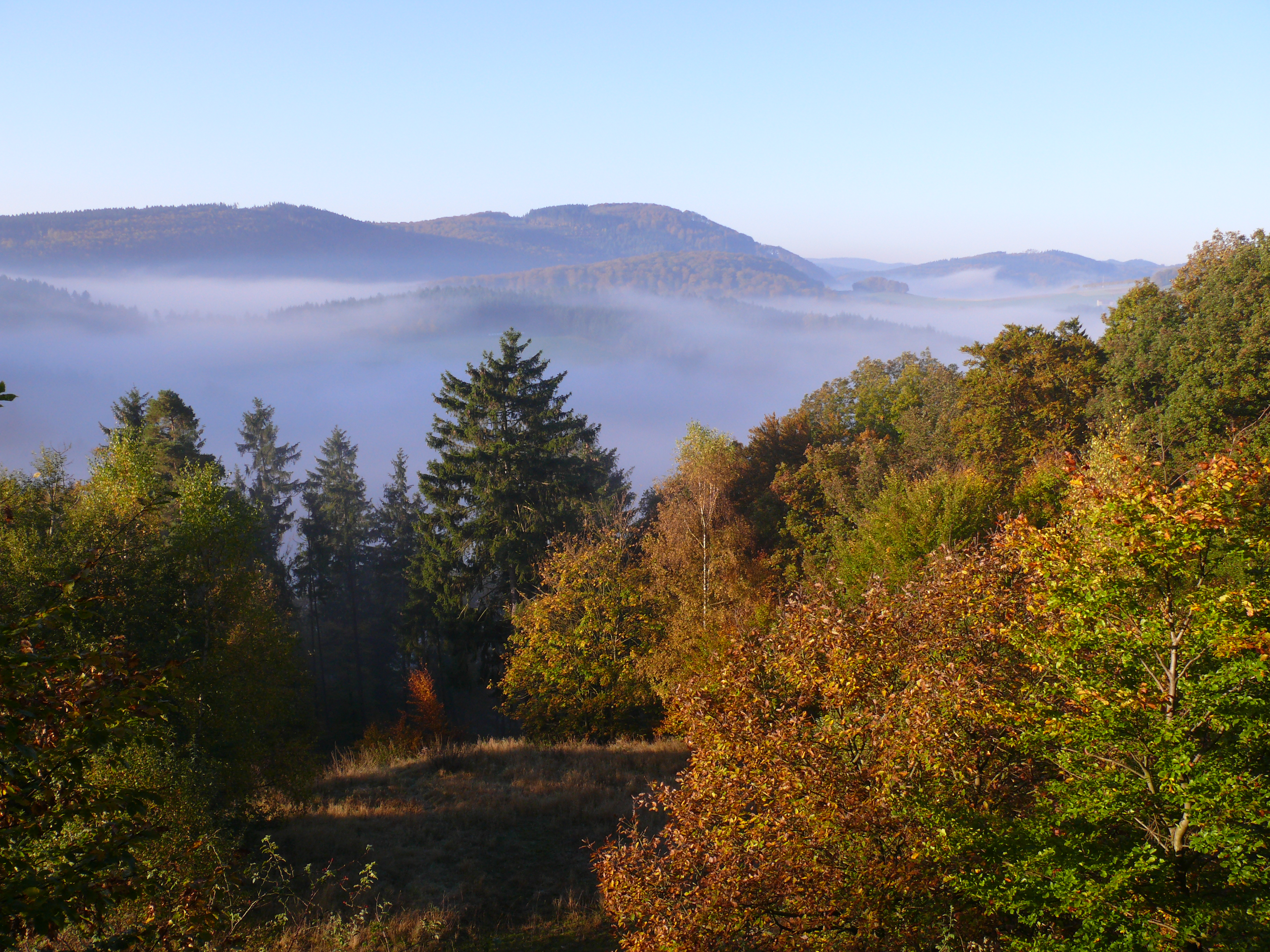 Indian Summer / Altweibersommer im Sauerland